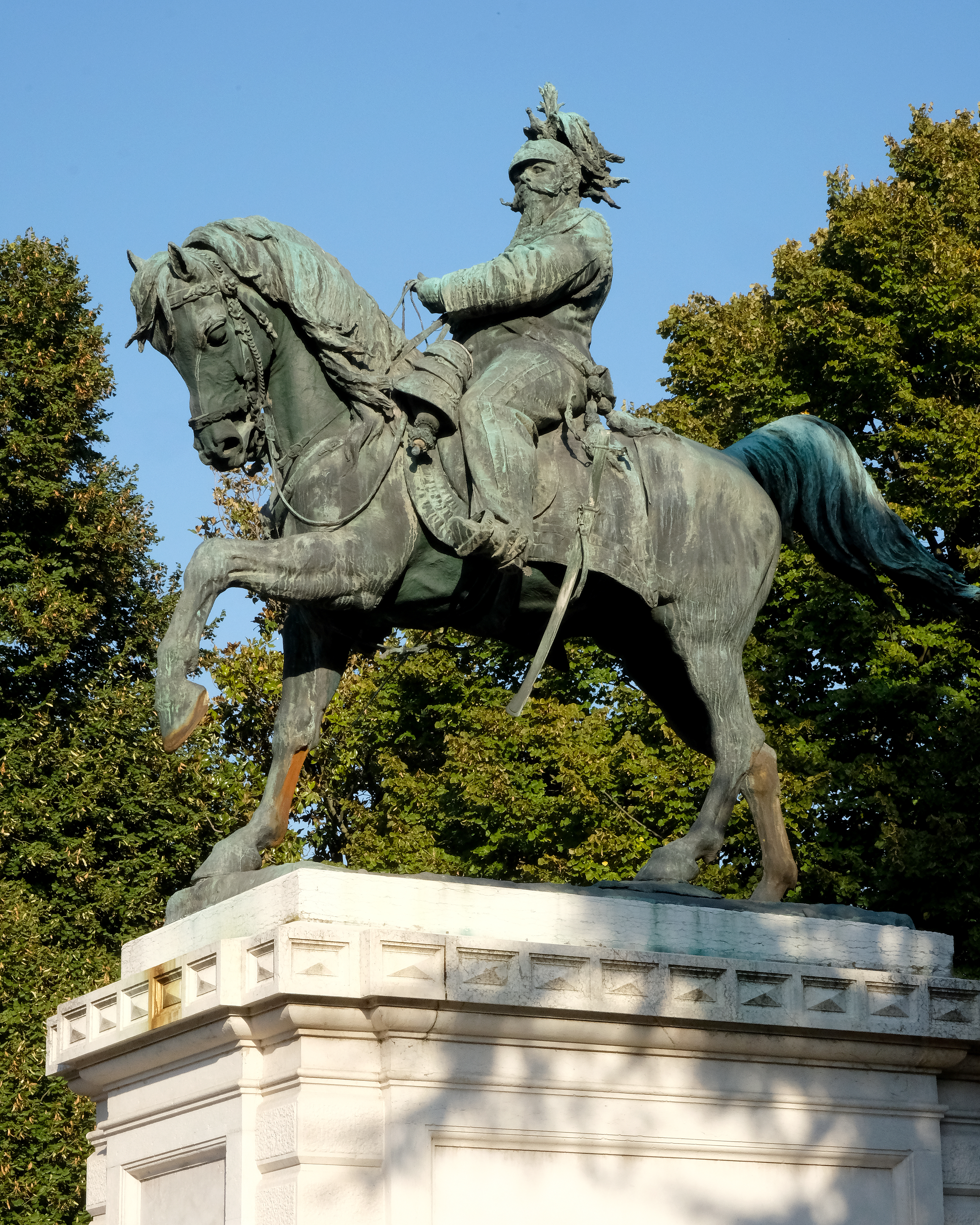 Monumento a Vittorio Emanuele II This is a photo of a monument which is part of cultural heritage of Italy.